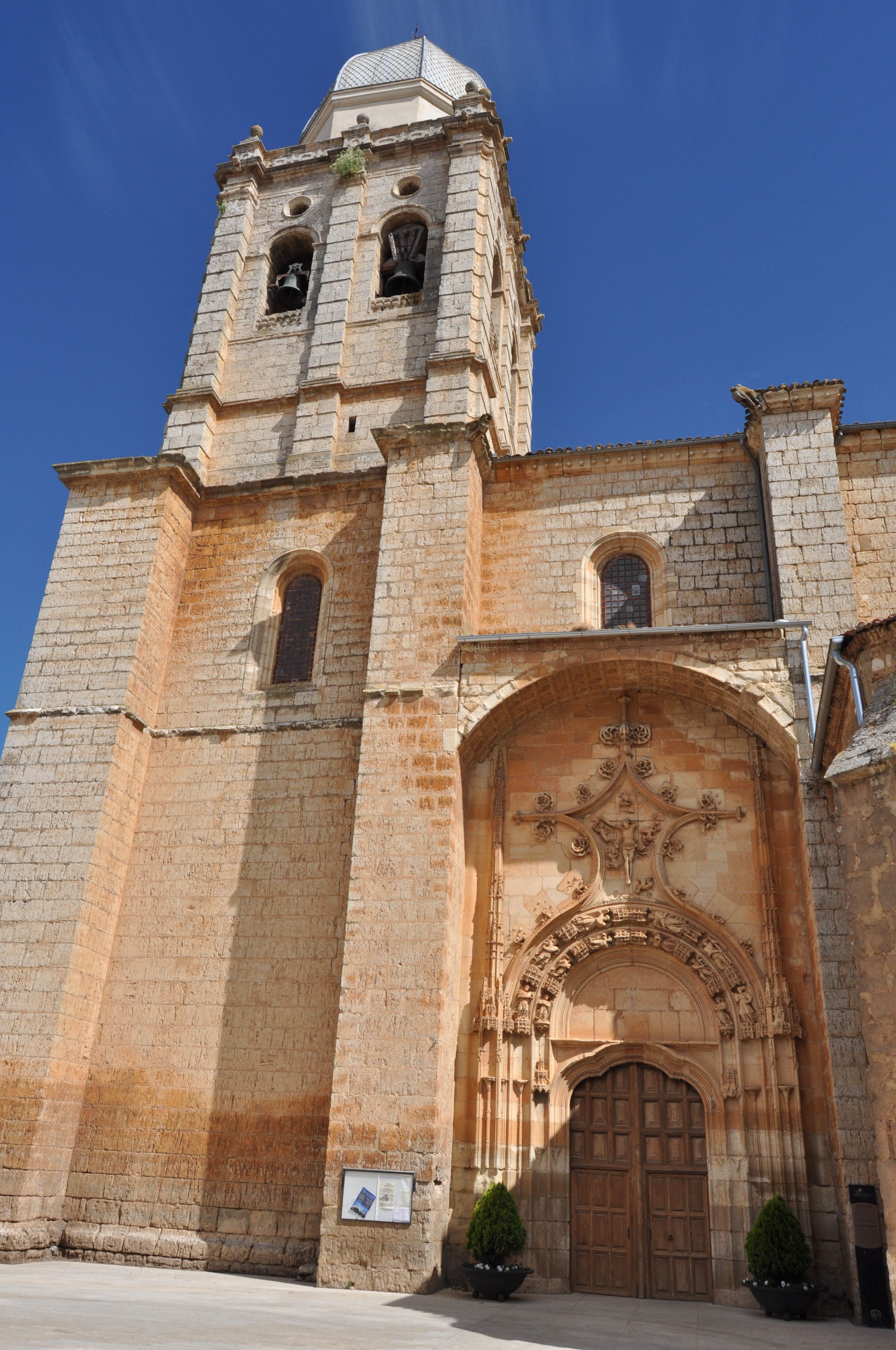 Melgar de Fernamental - 009